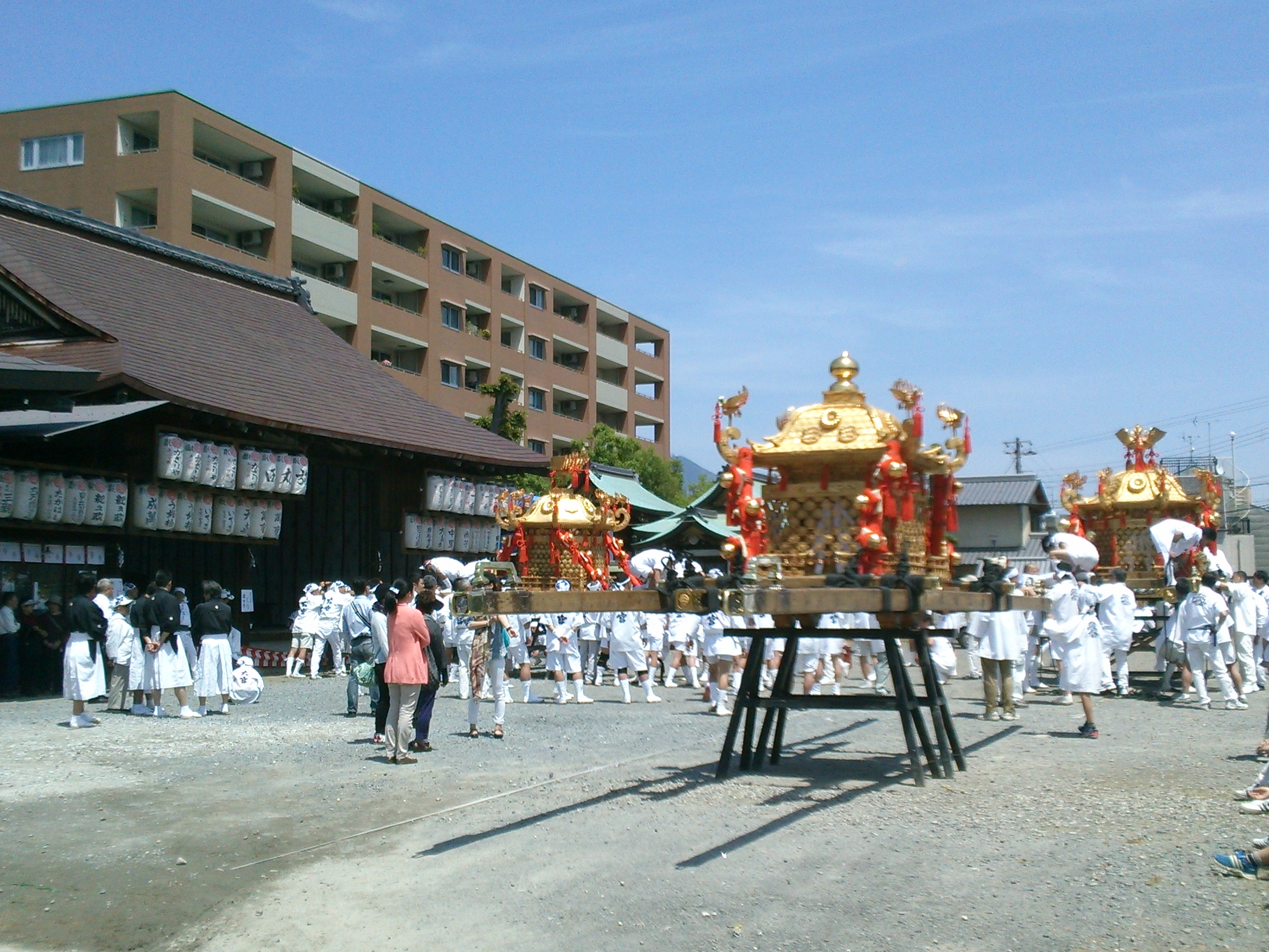 2013年の今宮神社還幸祭 若宮竪町の旅所で出立を待つ神輿3基